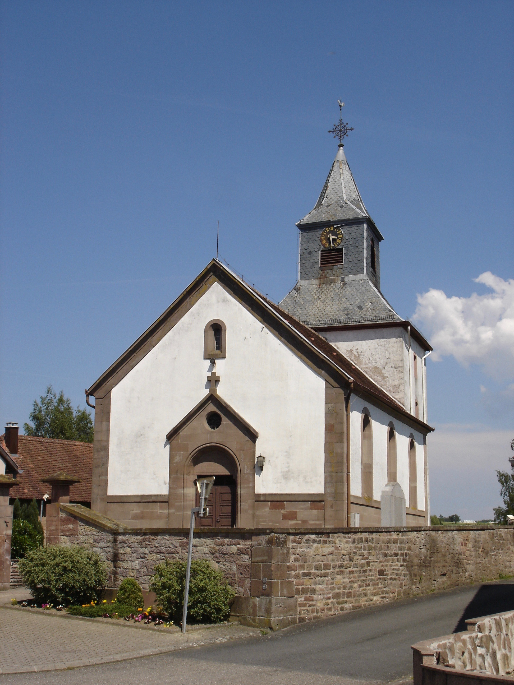 Église d'Ottwiller (1863)